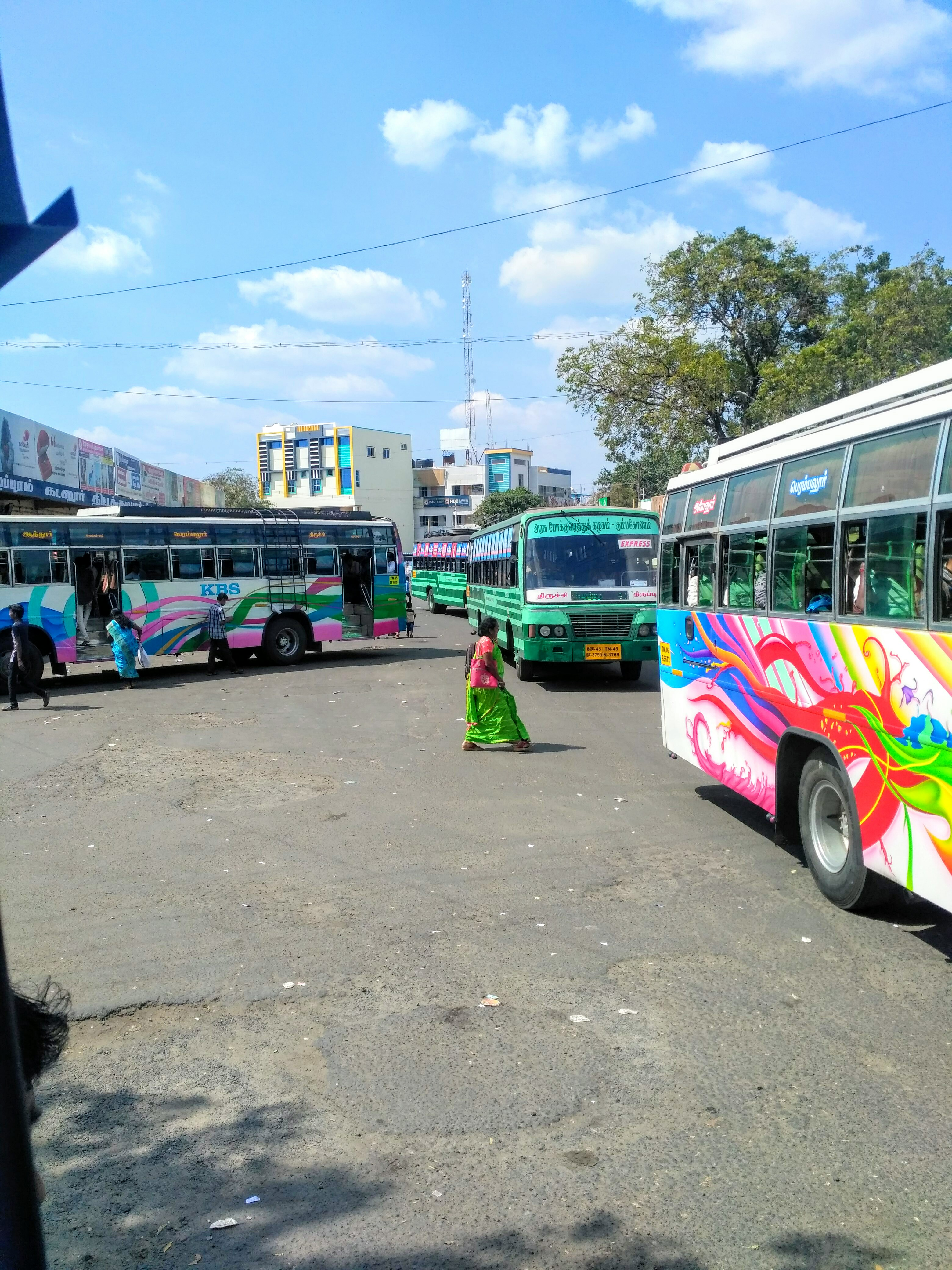 பெரம்பலூர் பேருந்து நிலையம்